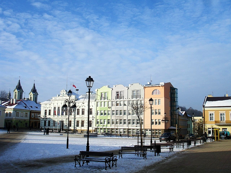 Rynek w Sanoku